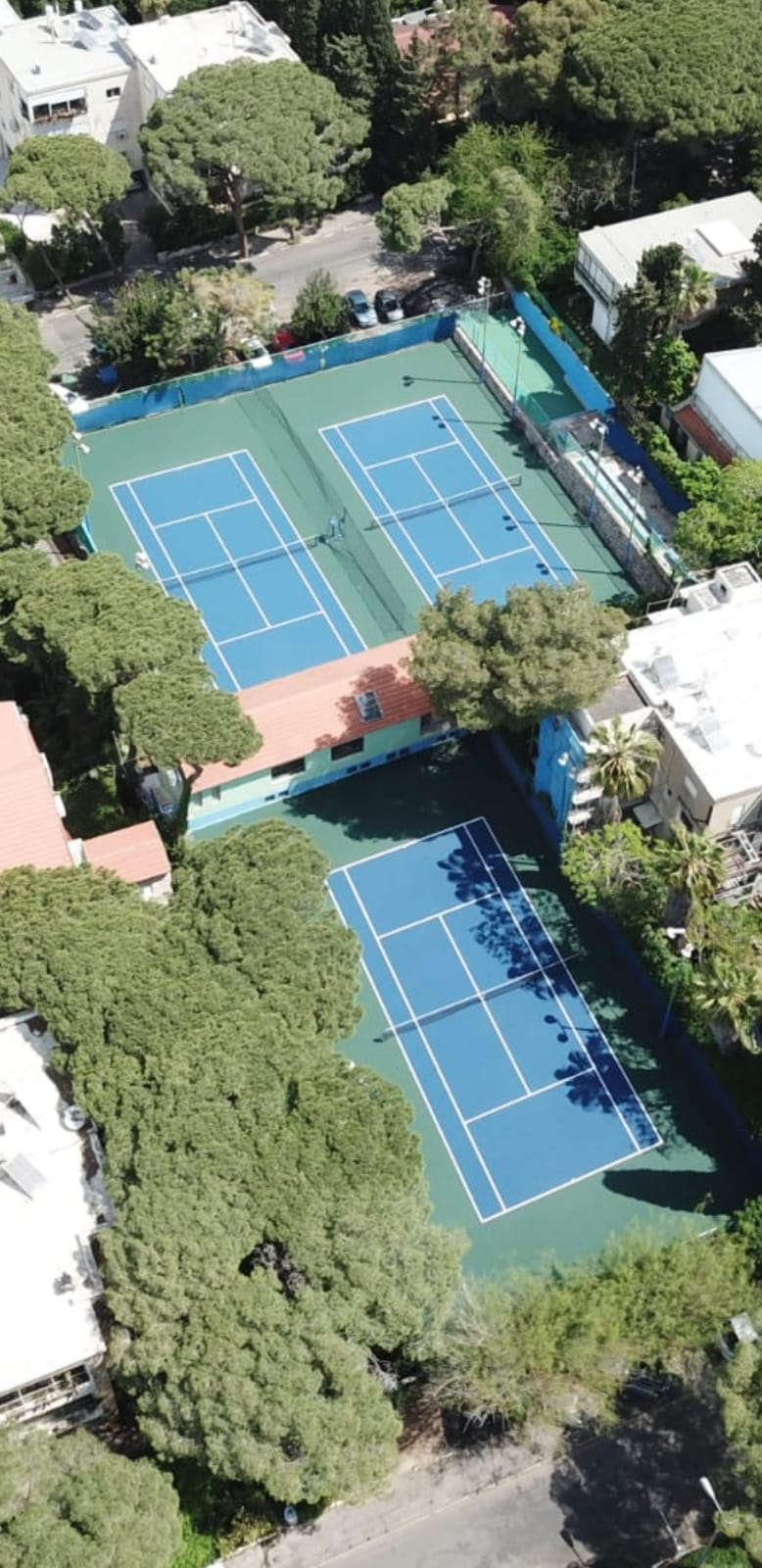 מבט על מועדון טניס כרמל חיפה